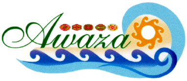 Герб Авазы